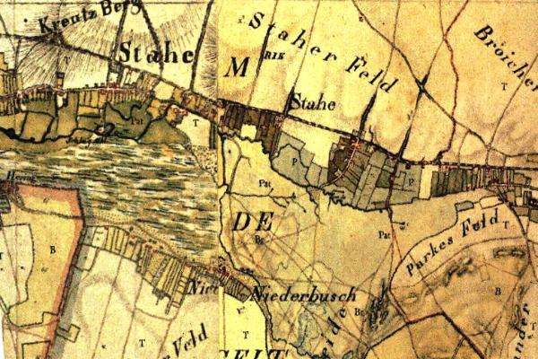 Kartenaufnahme der Rheinlande 1804/05